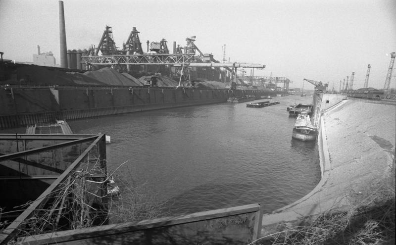 Friedrich Krupp-Hüttenwerk Rheinhausen